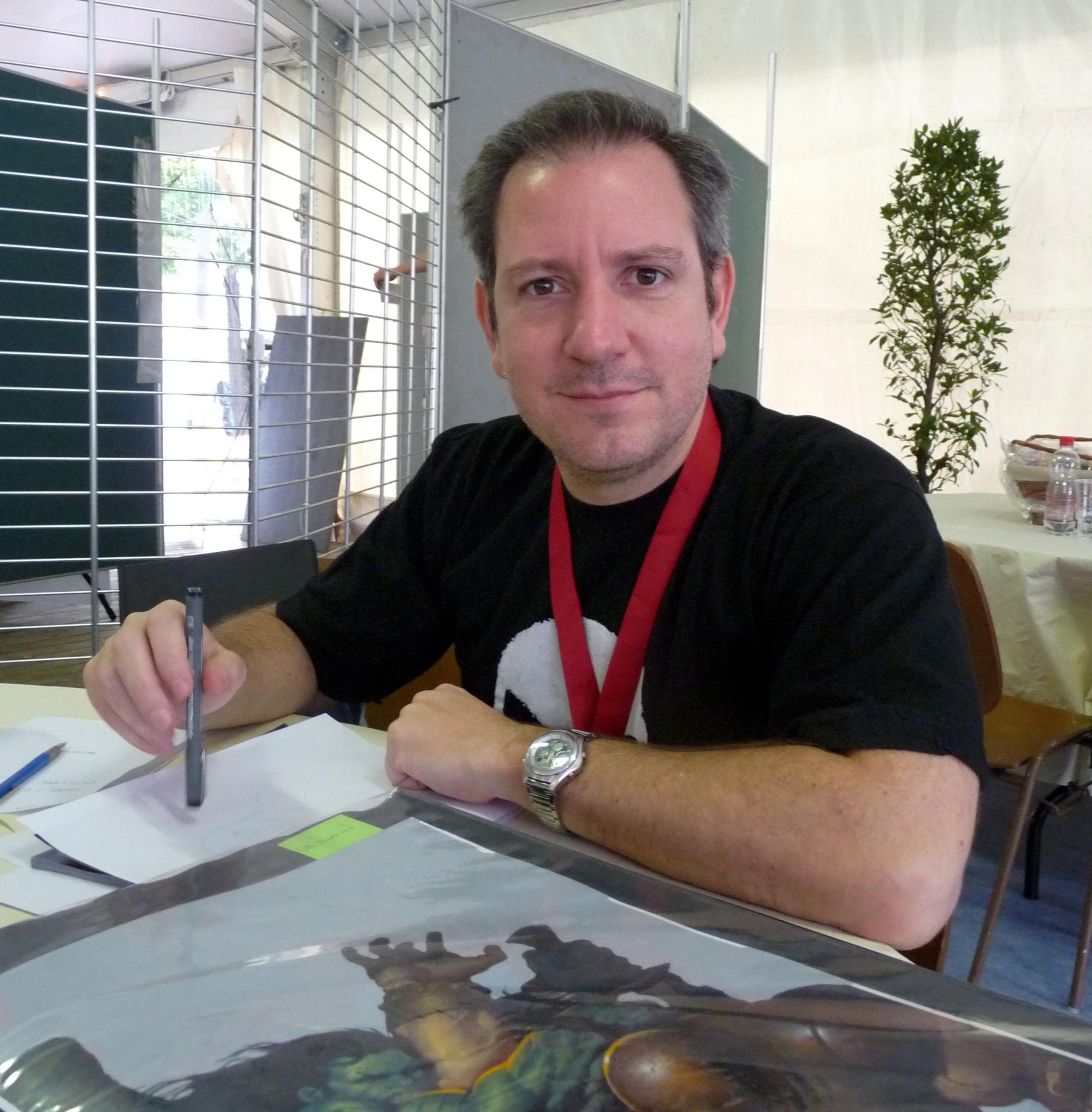 Ariel Olivetti au Festival européen de la bande dessinée Strasbulles 2009